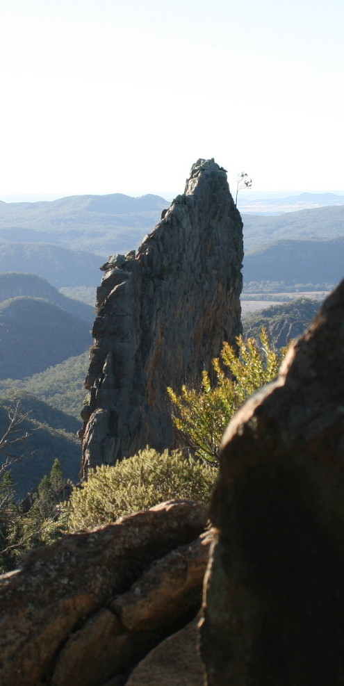 Breadknife-Felsen im Warrumbungle-Nationalpark